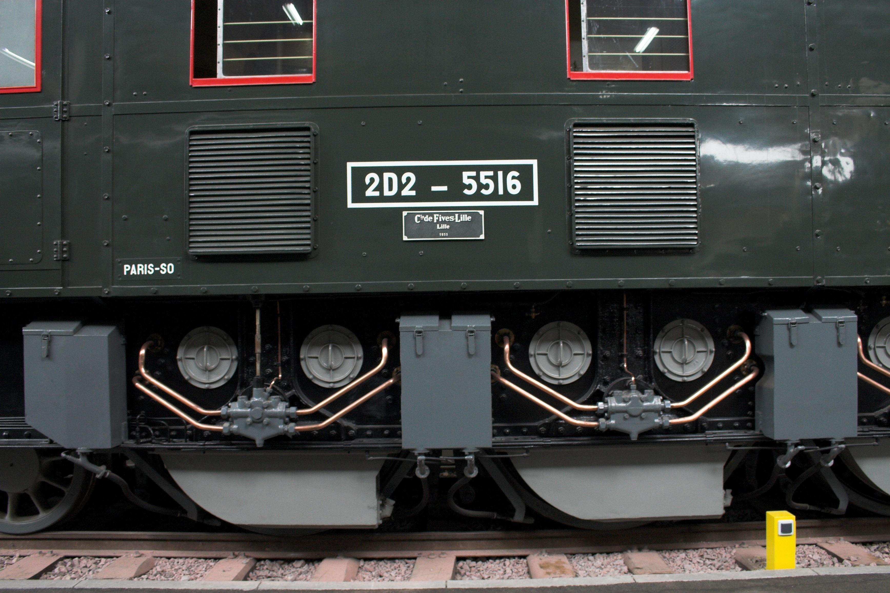 an electric locomotive 2D2-5516 at Cité du Train de Mulhouse(Mulhouse, France)